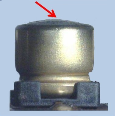 durch Reflow-Lötung aufgeblähter Elko-Becher